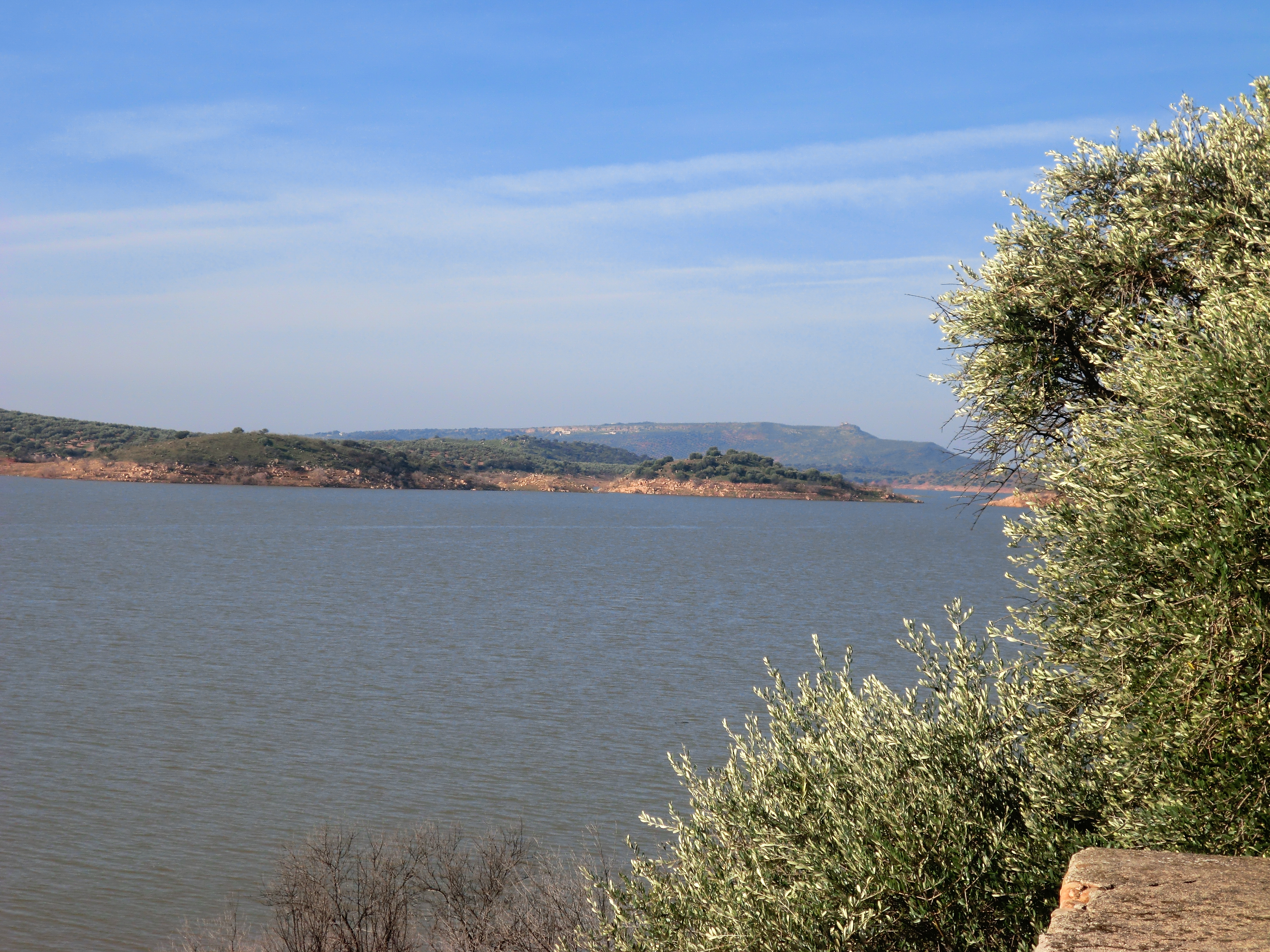 Embalse del Giribaile - Úbeda (Jaén)